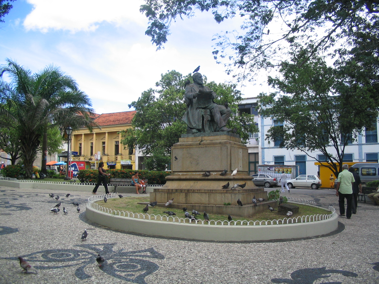 Português do Brasil: Praça João Francisco Lisboa: conjunto arquitetônico e paisagístico